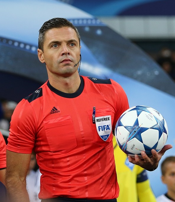 20.10.2015 Kyiv, Olimpiyskiy National Sports Complex Champions League. Group stage. FC Dynamo Kyiv - Chelsea - 0:0 Chelsea (4-2-3-1): Begovic; Zouma, Cahill, JT (c), Azpilicueta; Ramires, Matic; Willian, Fabregas (Oscar 75), Hazard; Diego Costa. Unused subs Blackman, Baba, Mikel, Traore, Kenedy, Falcao. Booked Zouma 67 Dynamo Kiev (4-1-4-1): Shovkovskiy; Danilo Silva, Khacheridi, Dragovic, Vida; Rybalka; Yarmolenko, Sydorchuk, Buyalskiy (Garmesh 83), Gonzalez; Kravets (Junior Moraes 78). Unused subs Rybka, Antunes, Petrovic, Gusev, Miguel Veloso. Booked Buyalskiy 65 20.10.2015 г.Киев. НСК "Олимпийский". Лига Чемпионов. Групповой этап Динамо — Челси 0:0 Динамо: Шовковский — Данило Силва, Драгович, Хачериди, Вида — Рыбалка, Буяльский (Гармаш, 83) — Ярмоленко, Сидорчук, Гонсалес — Кравец (Мораес, 78) Челси: Бегович — Аспиликуэта, Терри, Кэхилл, Зума — Матич, Рамирес — Виллиан, Фабрегас (Оскар, 75), Азар — Д. Коста Предупреждения: Буяльский — Зума